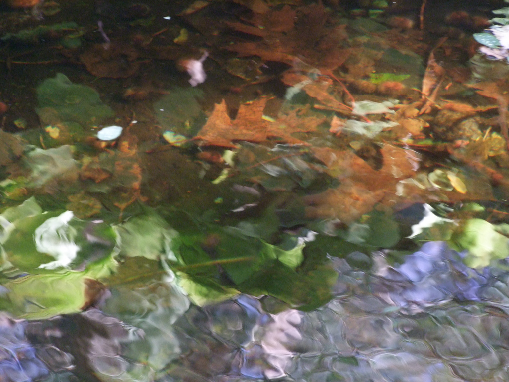 Folhas debaixo de água na Penha, Guimarães.